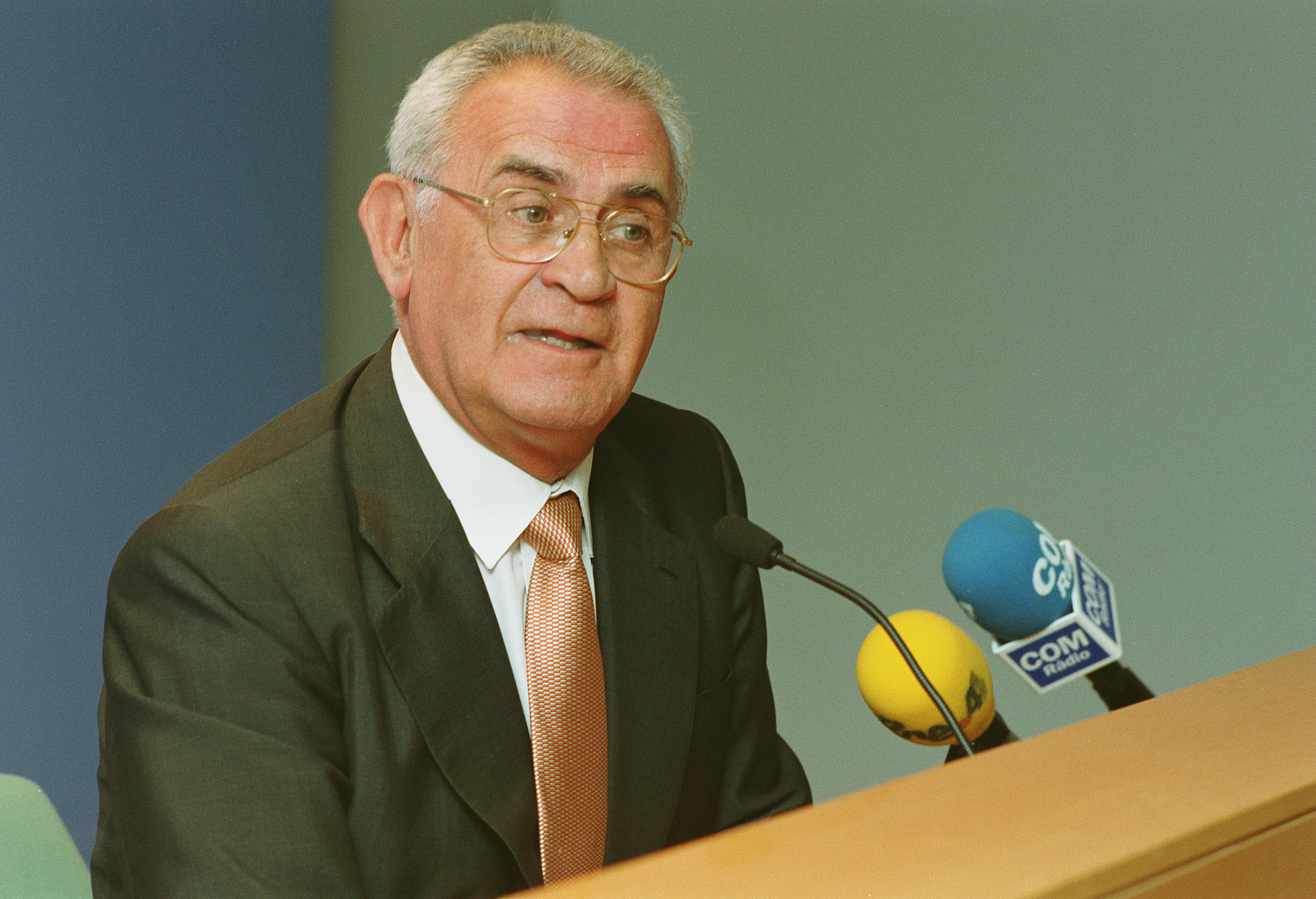 Sánchez Terán al MHC el 2001.